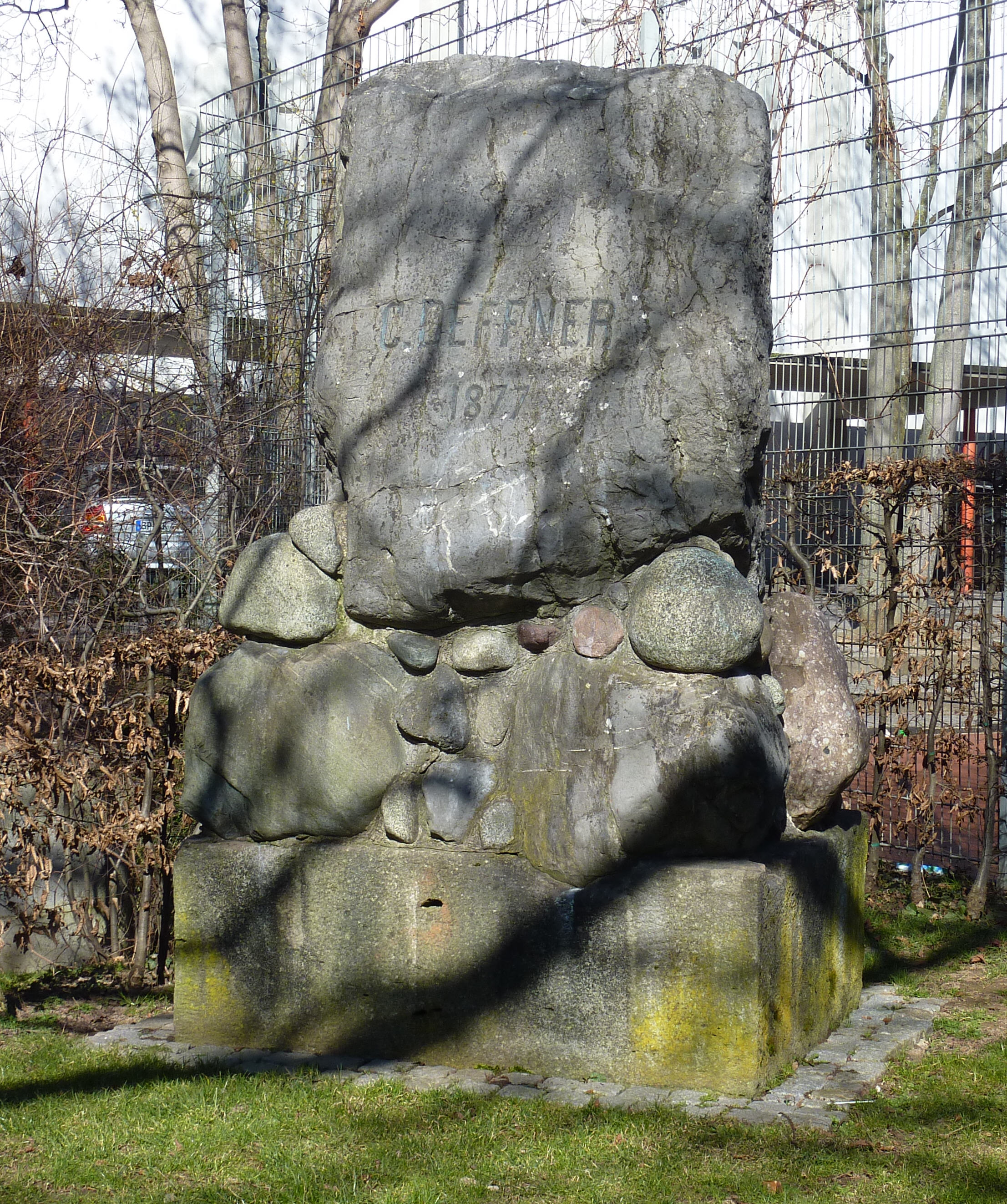 Deffnerstein in Esslingen am Neckar